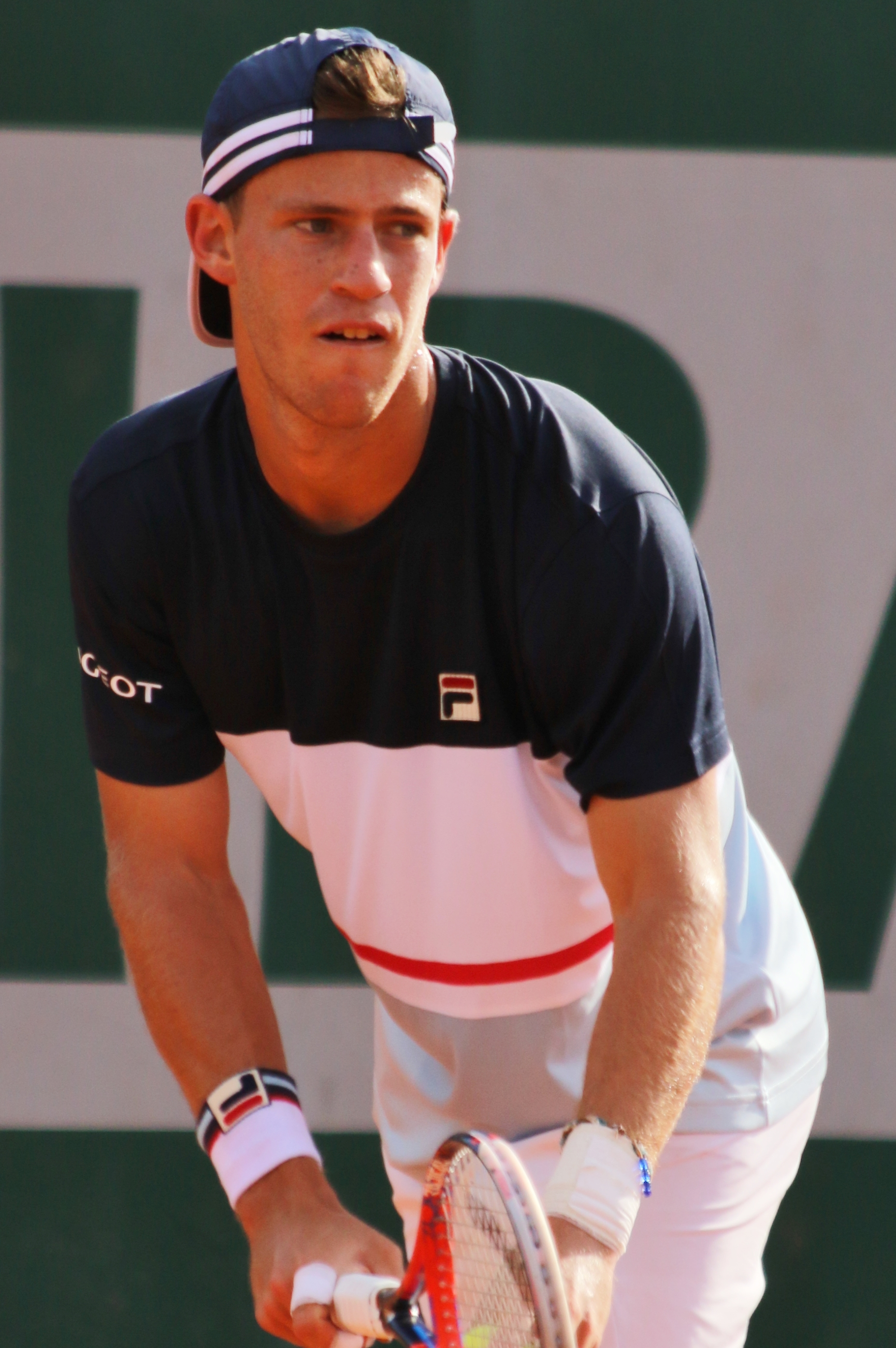 Schwartzman RG18 (3)